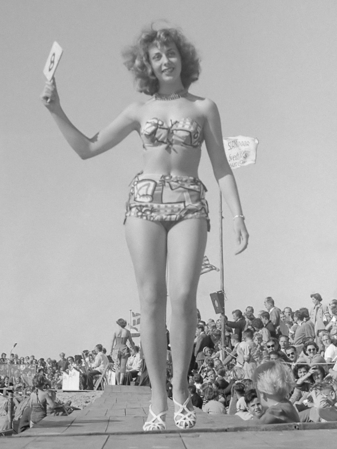 Verkiezing Miss Zandvoort; Mimi Kok 15 juli 1951